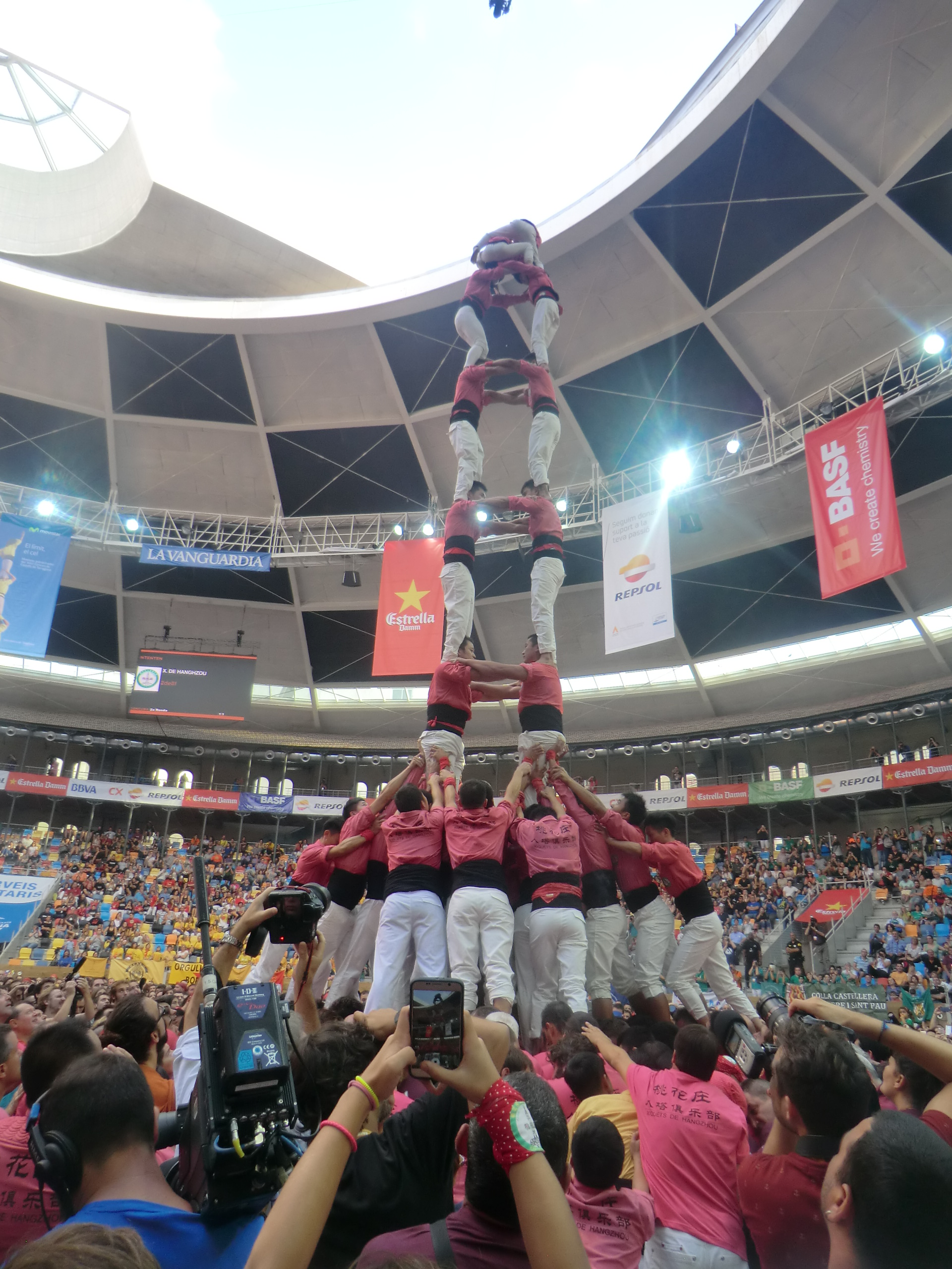 2 de 8 amb folre dels Xiquets de Hanghzou al Concurs de Castells de Tarragona 2016